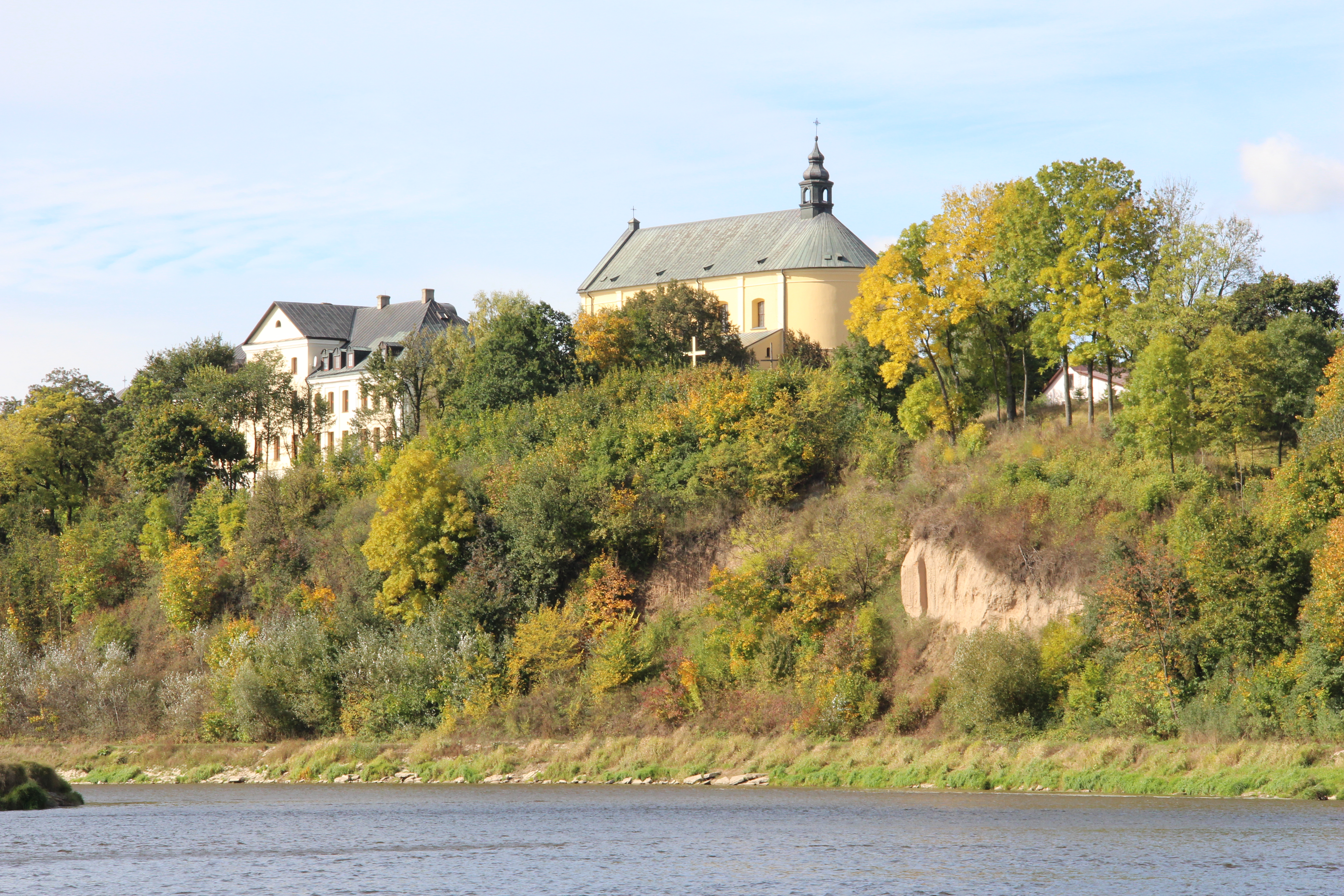 Widok na Drohiczyn znad Bugu.